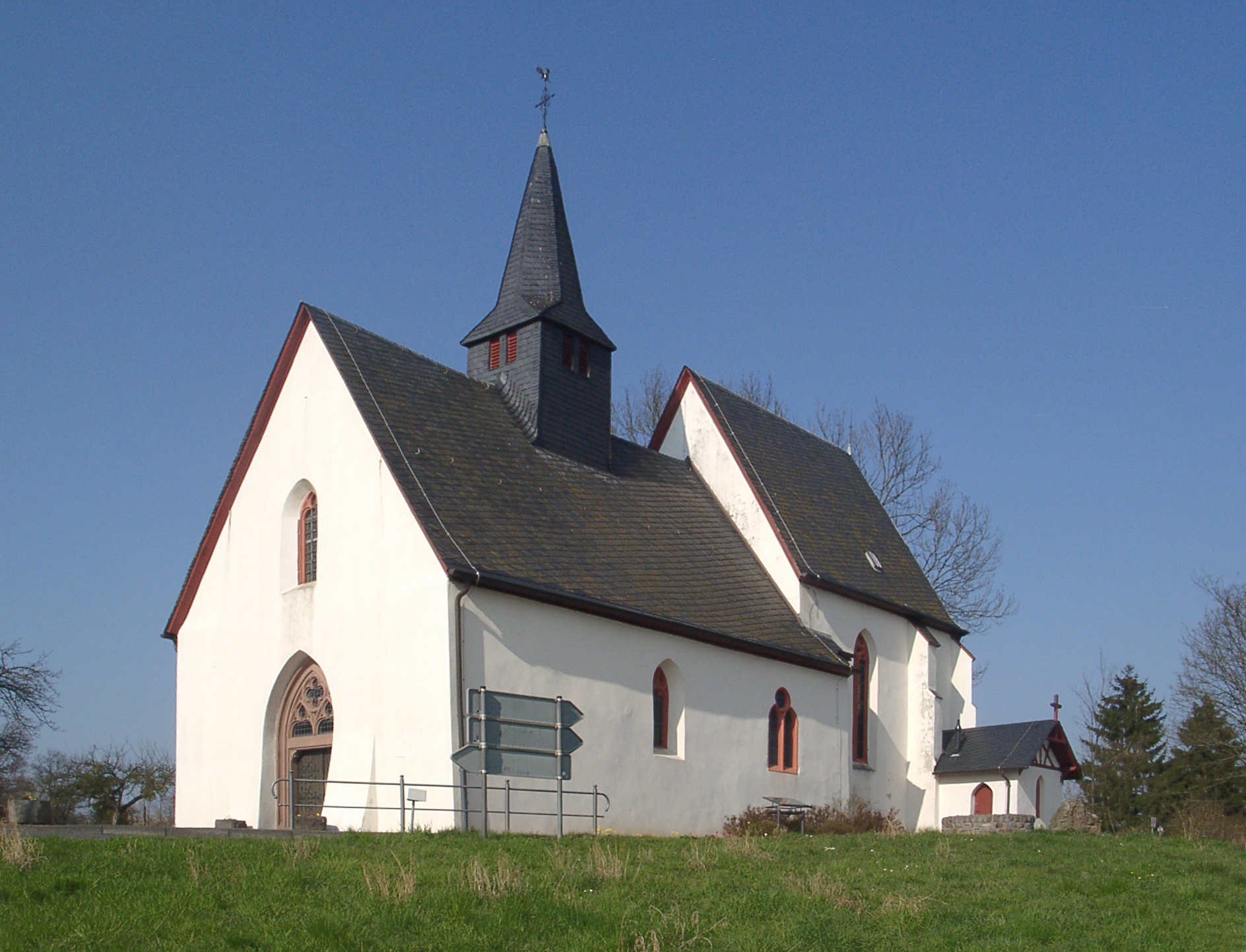 Valwigerberg, Valwig an der Mosel, Kirche St. Maria und Maria Magdalena